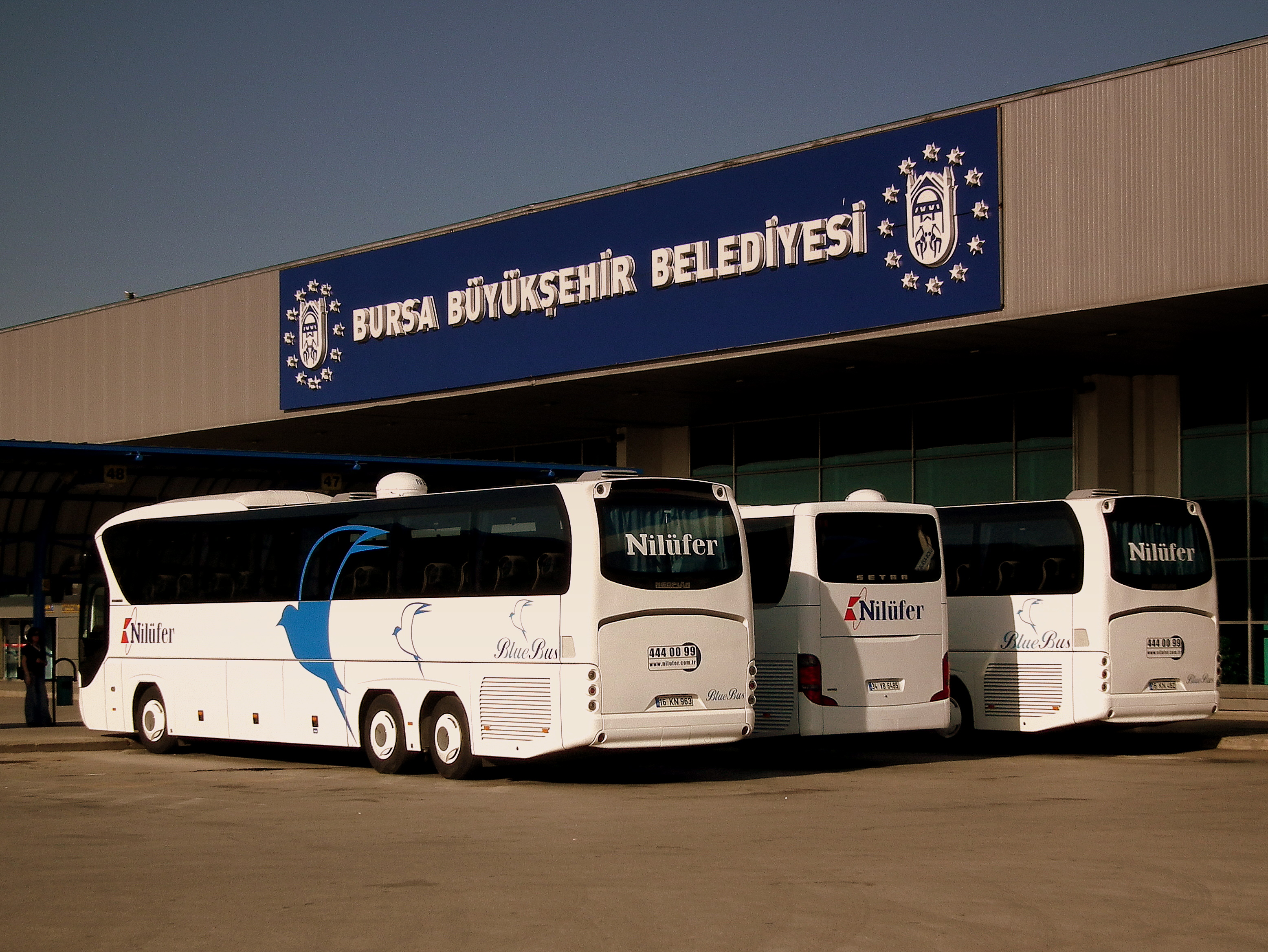 OTOGAR/BUS STATION BUYUKSEHIR TURKEY OCT 2011